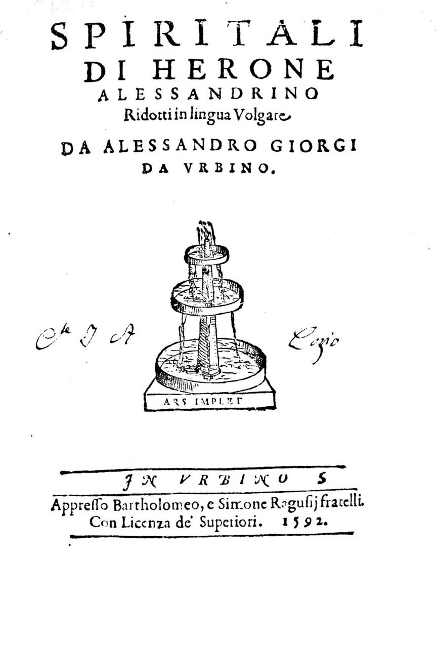 Spiritali di Herone Alessandrino ridotti in lingua volgare da Alessandro Giorgi da Vrbino. - In Vrbino : appresso Bartholomeo, e Simone Ragusij fratelli, 1592. - [4], 82 c. : ill. ; 4º .